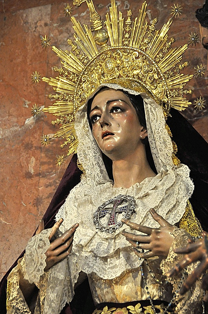 Imagen de María Santísima de la Trinidad en su retablo en Iglesia de Santa Cruz (Catedral Vieja).